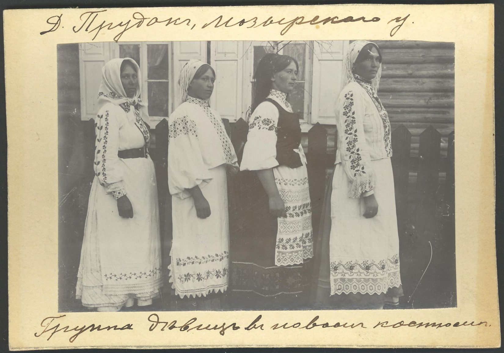 Група дзяўчын у новых касцюмах з вышыўкай, в. Прудок Мазырскага павета Мінскай губерні (в. Прудок Мазырскага раёна Гомельскай вобласці